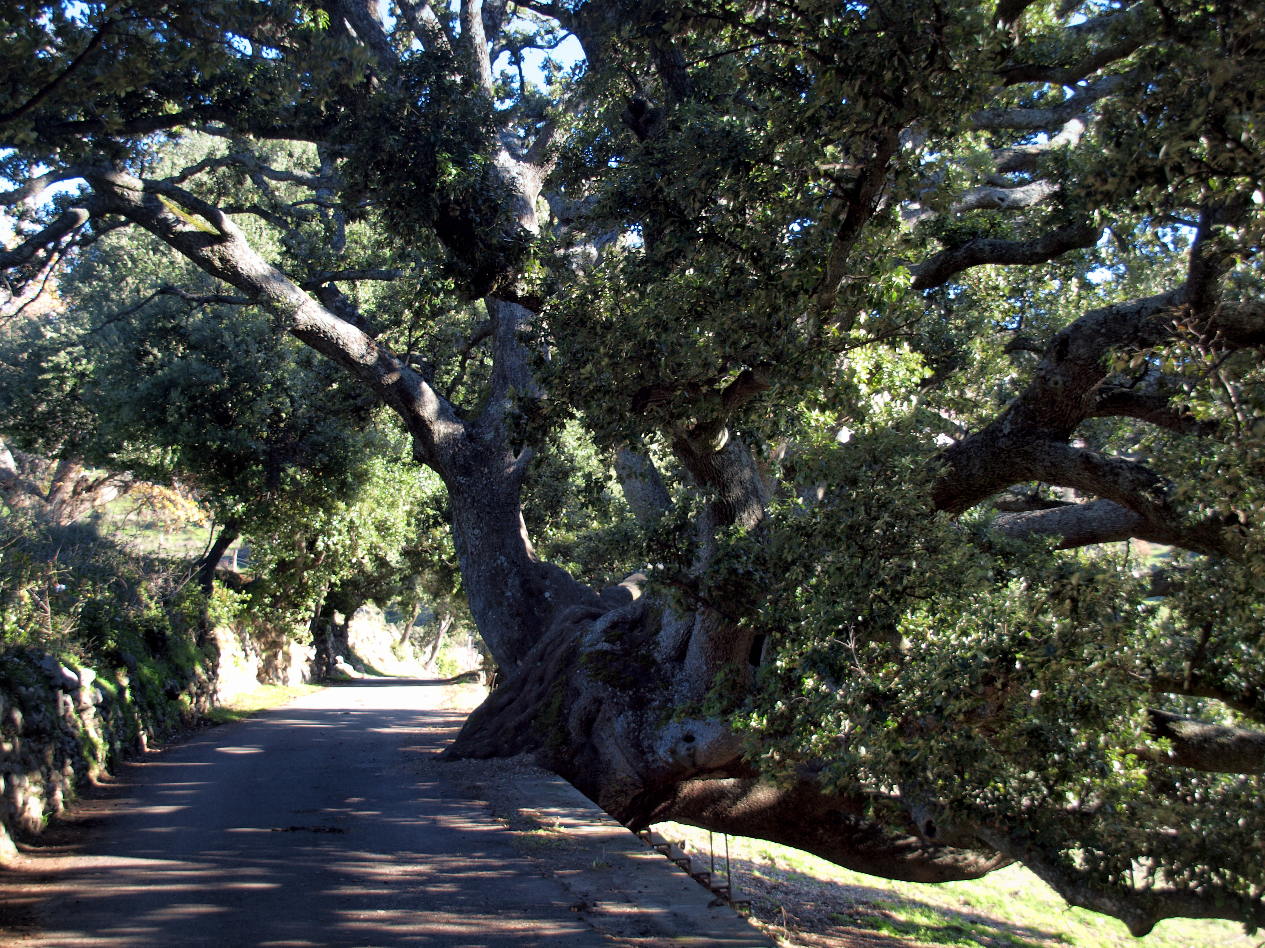 Olmi-Cappella (Giussani, Haute-Corse, France) - Un chêne vert vénérable, le plus gros de Balagne selon un panneau.